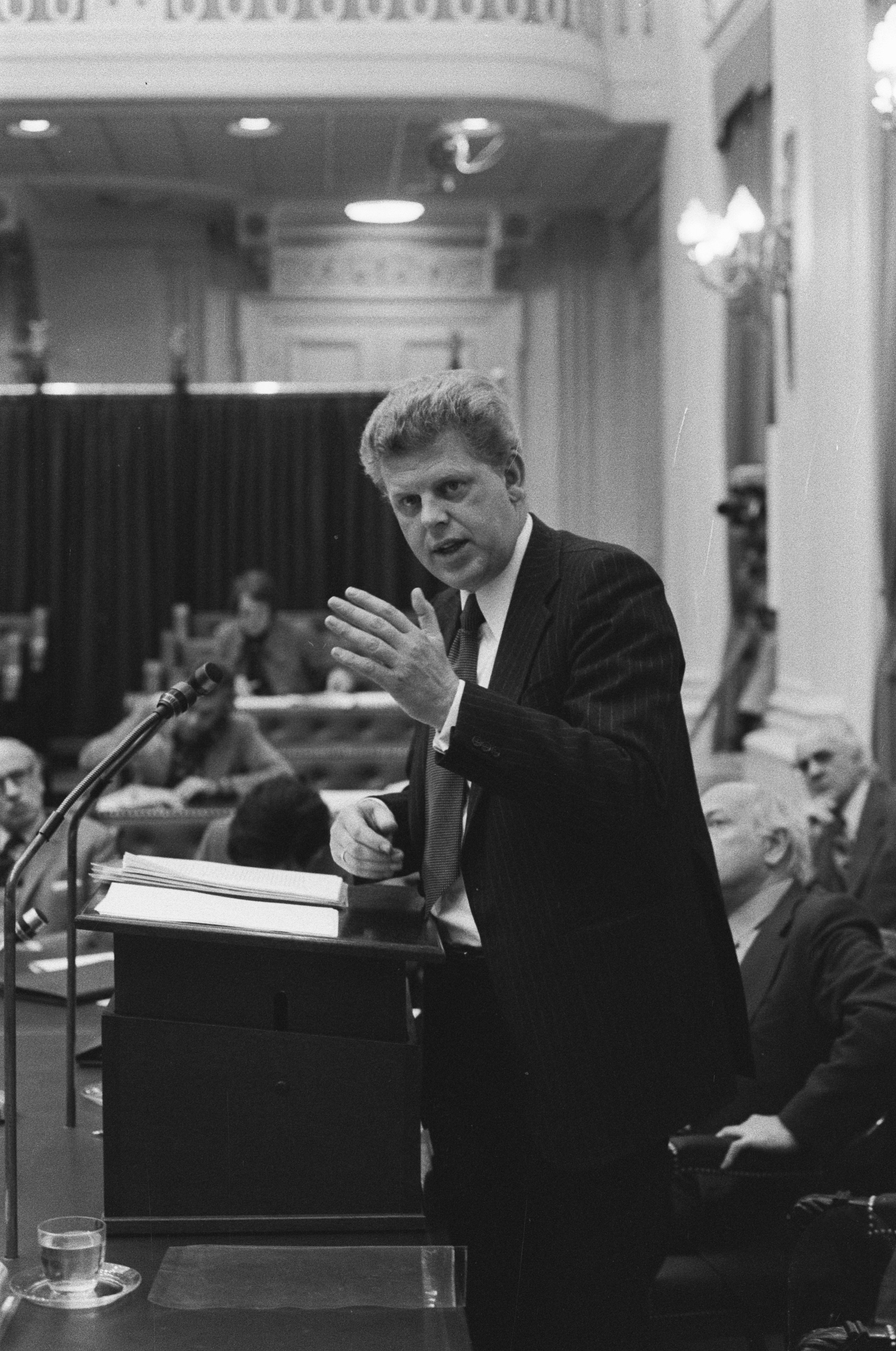 Collectie / Archief : Fotocollectie Anefo Reportage / Serie : [ onbekend ] Beschrijving : Algemene beschouwingen Tweede Kamer; minister Duisenberg spreekt Datum : 9 oktober 1975 Locatie : Den Haag, Zuid-Holland Trefwoorden : ministers, overheidsbegrotingen, parlementaire debatten, politiek Persoonsnaam : Duisenberg, W.F. Fotograaf : Peters, Hans / Anefo Auteursrechthebbende : Nationaal Archief Materiaalsoort : Negatief (zwart/wit) Nummer archiefinventaris : bekijk toegang 2.24.01.05 Bestanddeelnummer : 928-1969